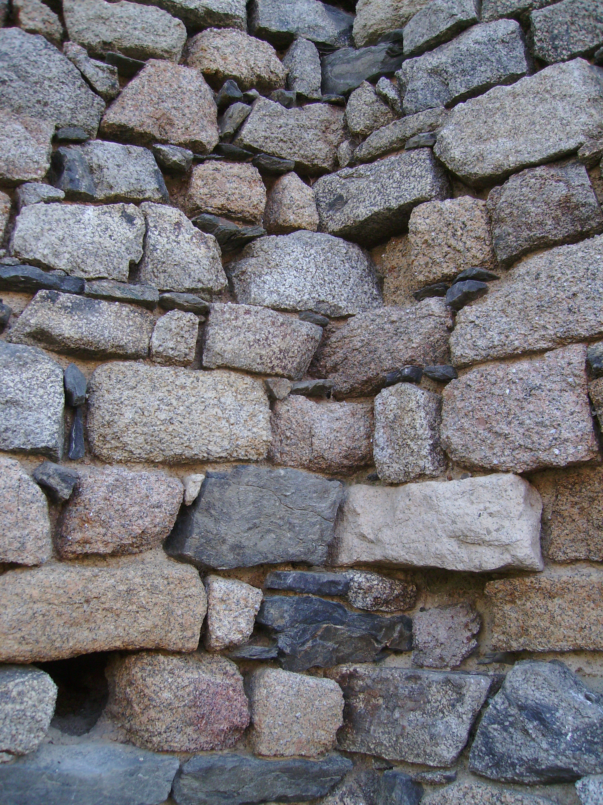 Détail de l'appareillage des pierres dans la maçonnerie du donjon de Châteaumur.